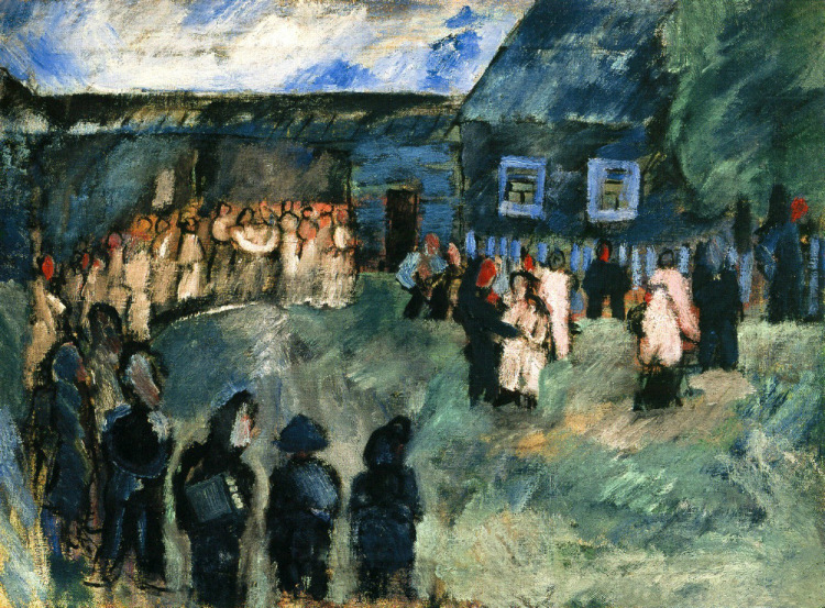 Картины художника Прокошева Николая Ивановича (Россия, 1904-1938)